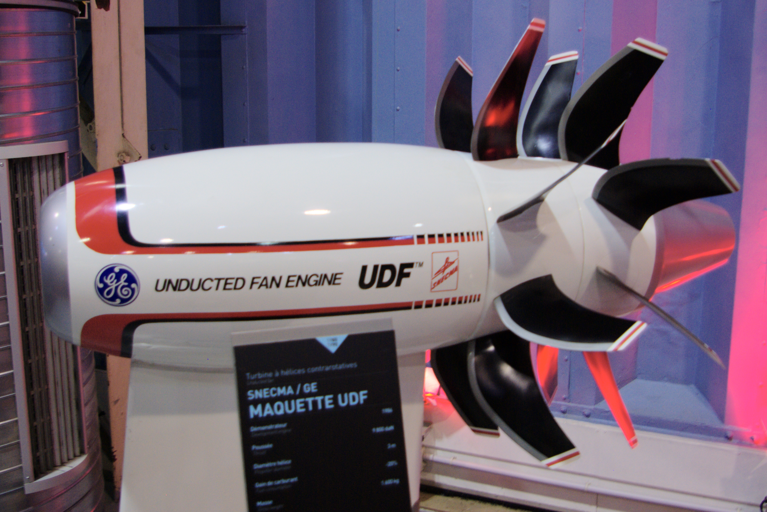 Maquette de l'Unducted Fan engine (UDF) présentée au musée Safran.